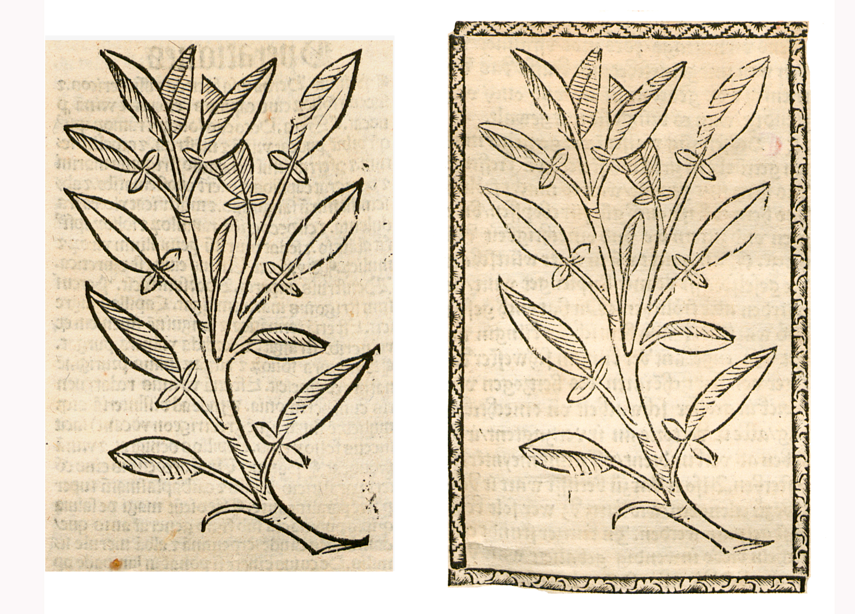 Abbildung von: Orecht Salbei (Salvia)